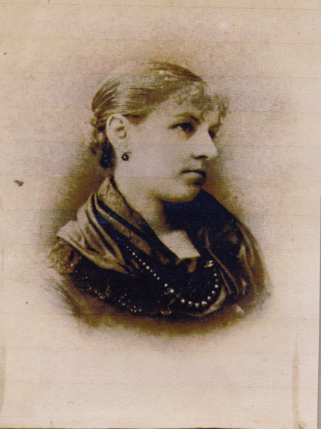 Susana Correa Vergara es hija de Vicente Correa Albano y de Agustina Vergars Lois. Fotografía del año 1880 en Santiago de Chile.